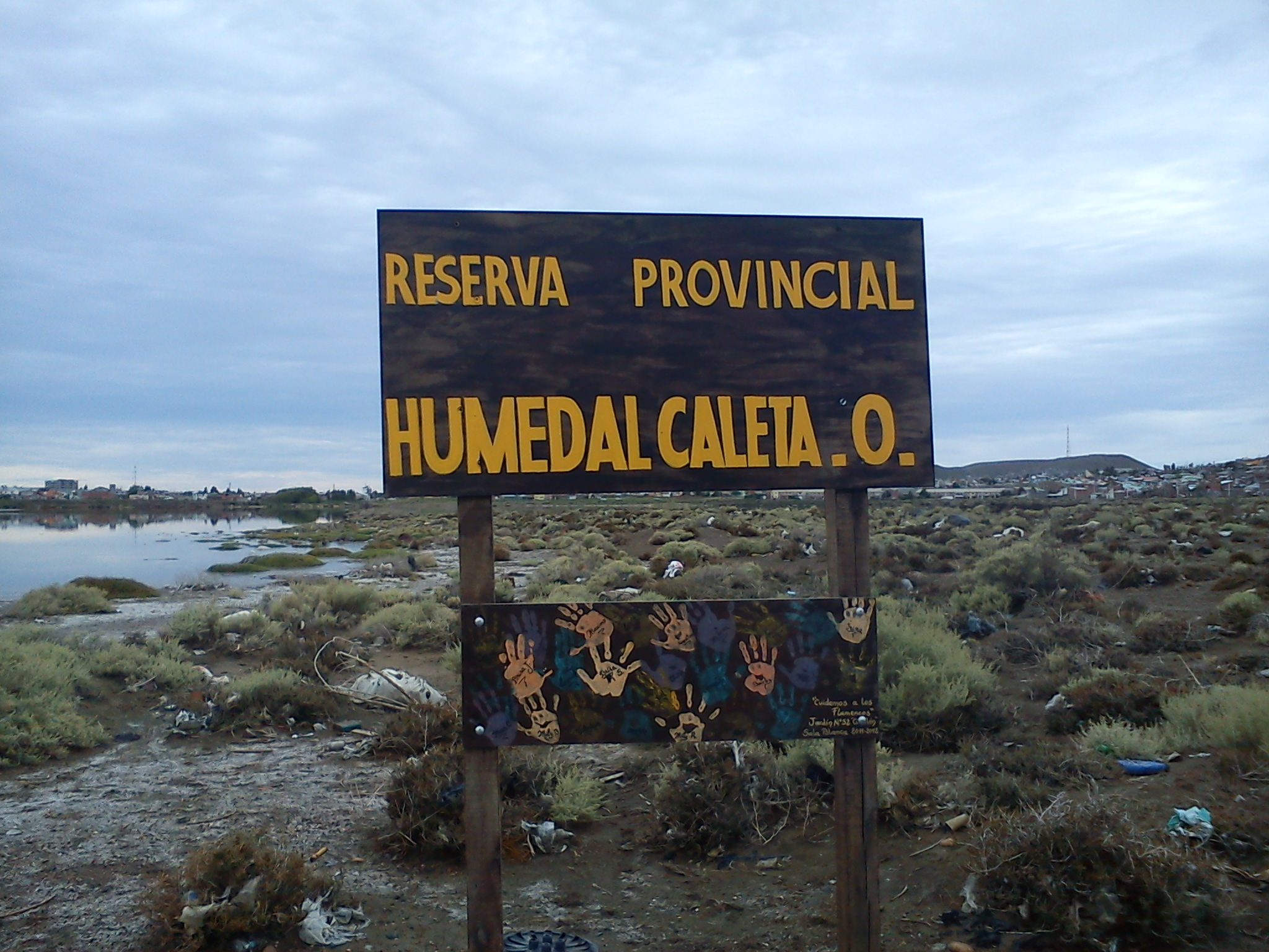 Cartel indicando humedal